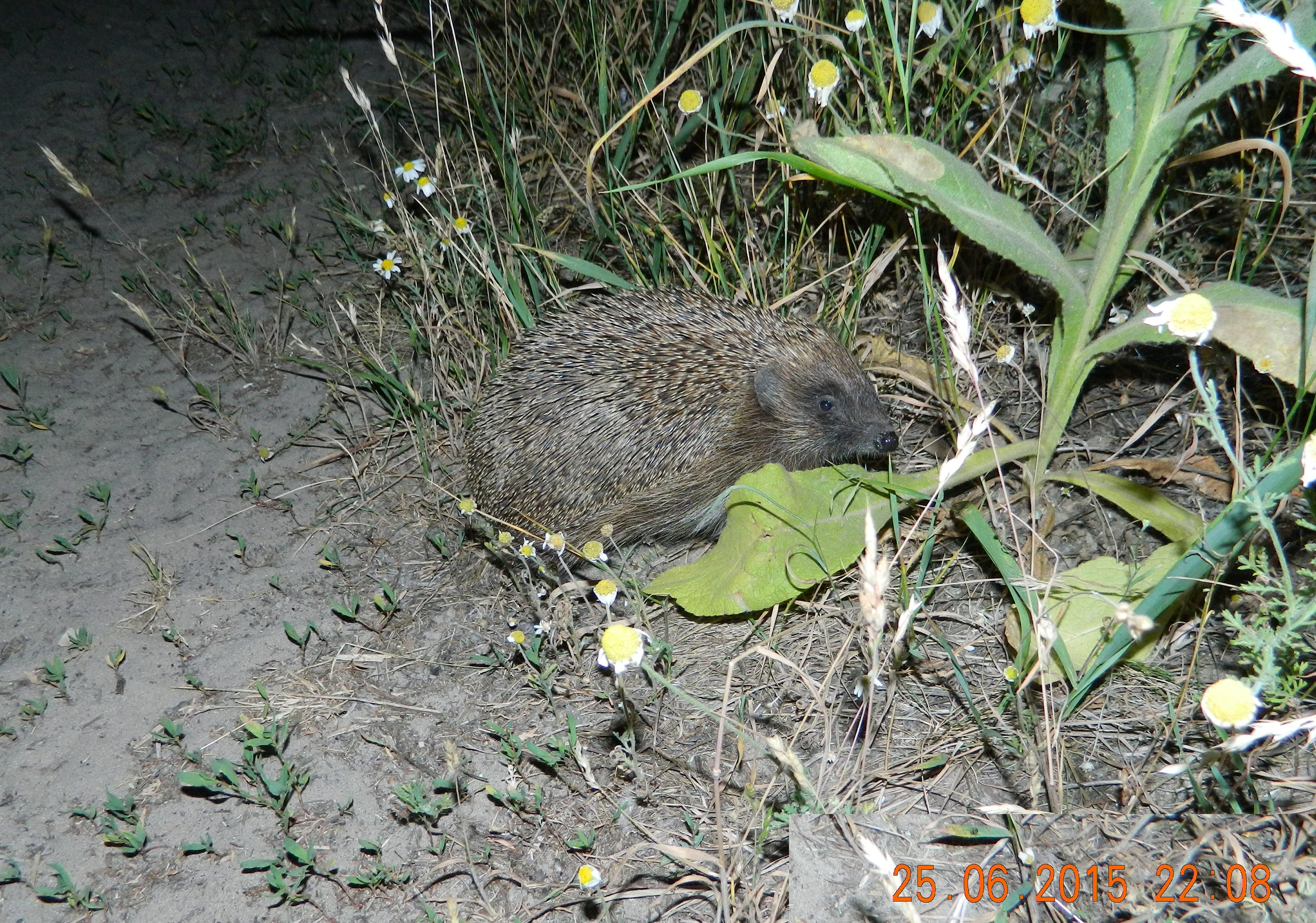 Їжак вночі. Координати місцезнаходження 50.726014, 30.374403. Київська область, Вишгородський район The Hedgehog at night. Location coordinates 50.726014, 30.374403. Kyiv region, Vyshgorodsky rayon Hérisson la nuit. Situation coordonne 50,726014, 30,374403. La région de Kyiv, le raion Vyshgorodsky